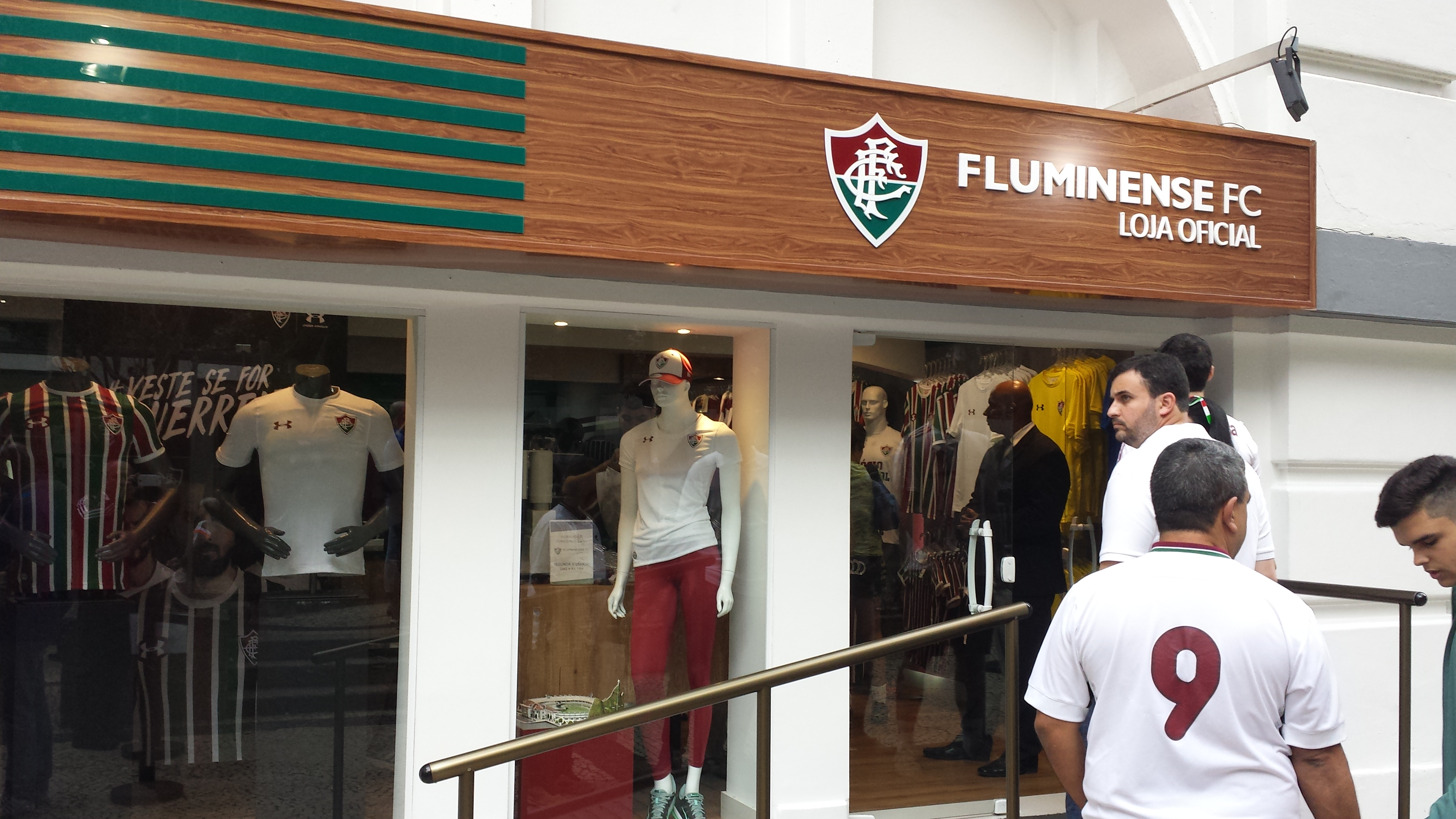 Loja oficial do Fluminense em 22-07-2017